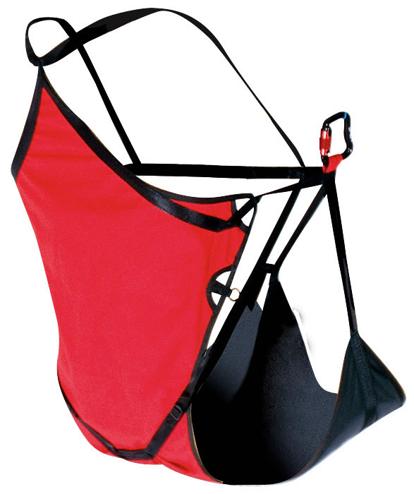 voir Utilisateur:FredB/Autorisation photos SUP'AIR